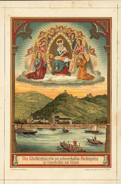 Wallfahrtsbild Bornhofen